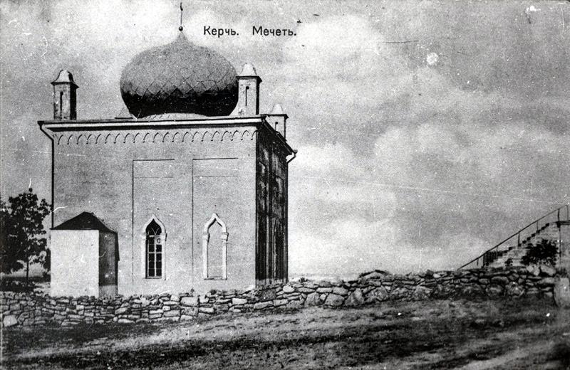 Открытка. Мечеть в Керчи, 1910-е